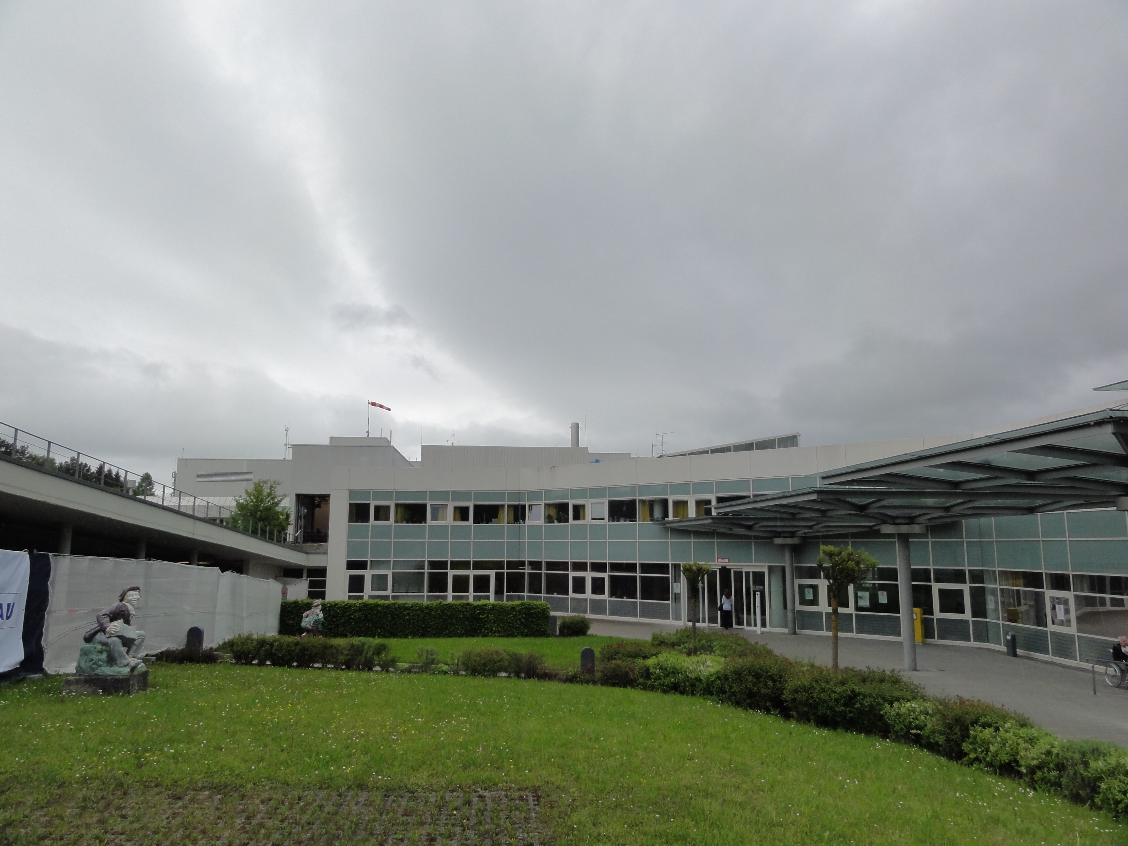 Murnau am Staffelsee, Germany